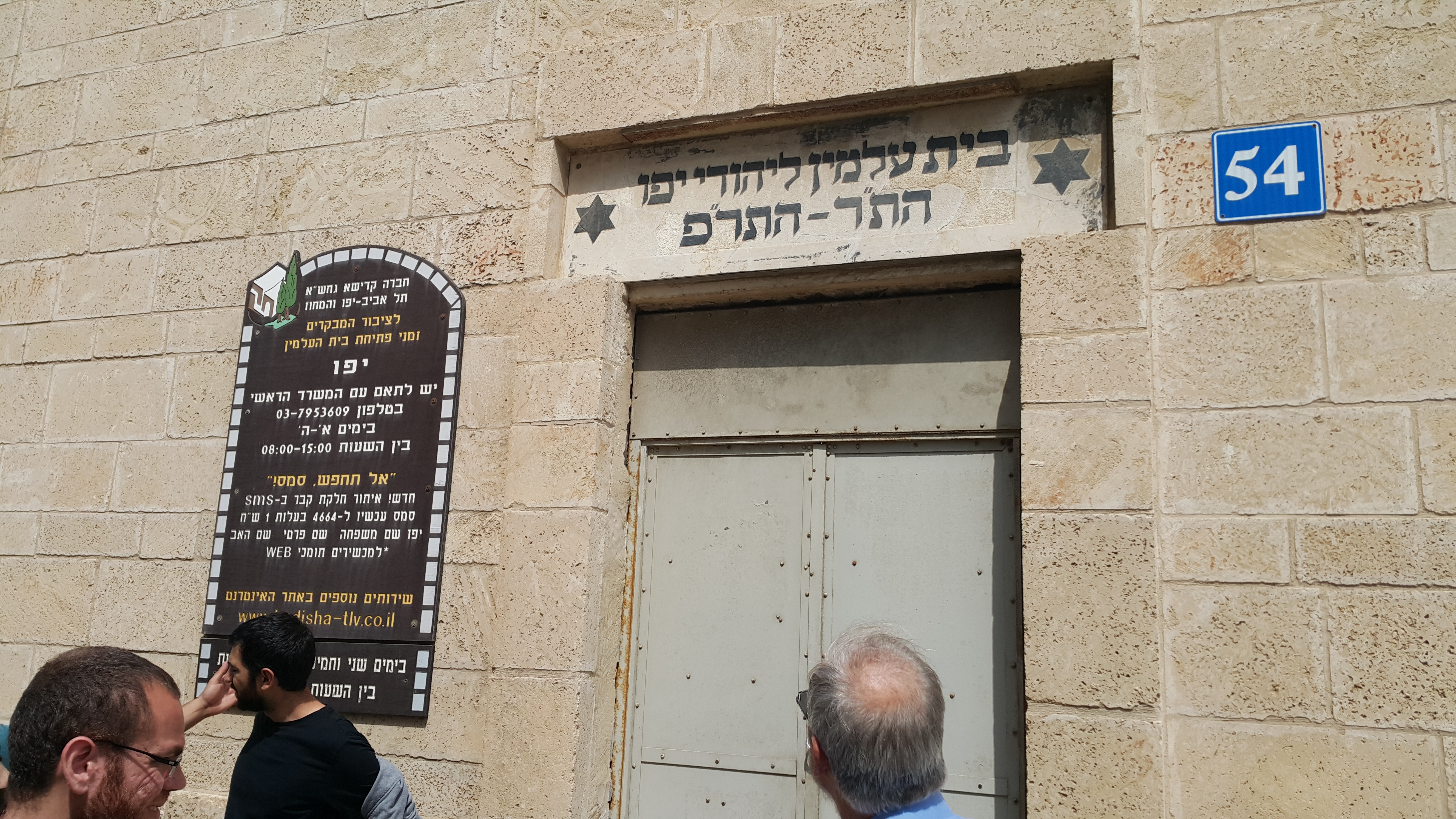 בית הקברות היהודי הראשון ביפו